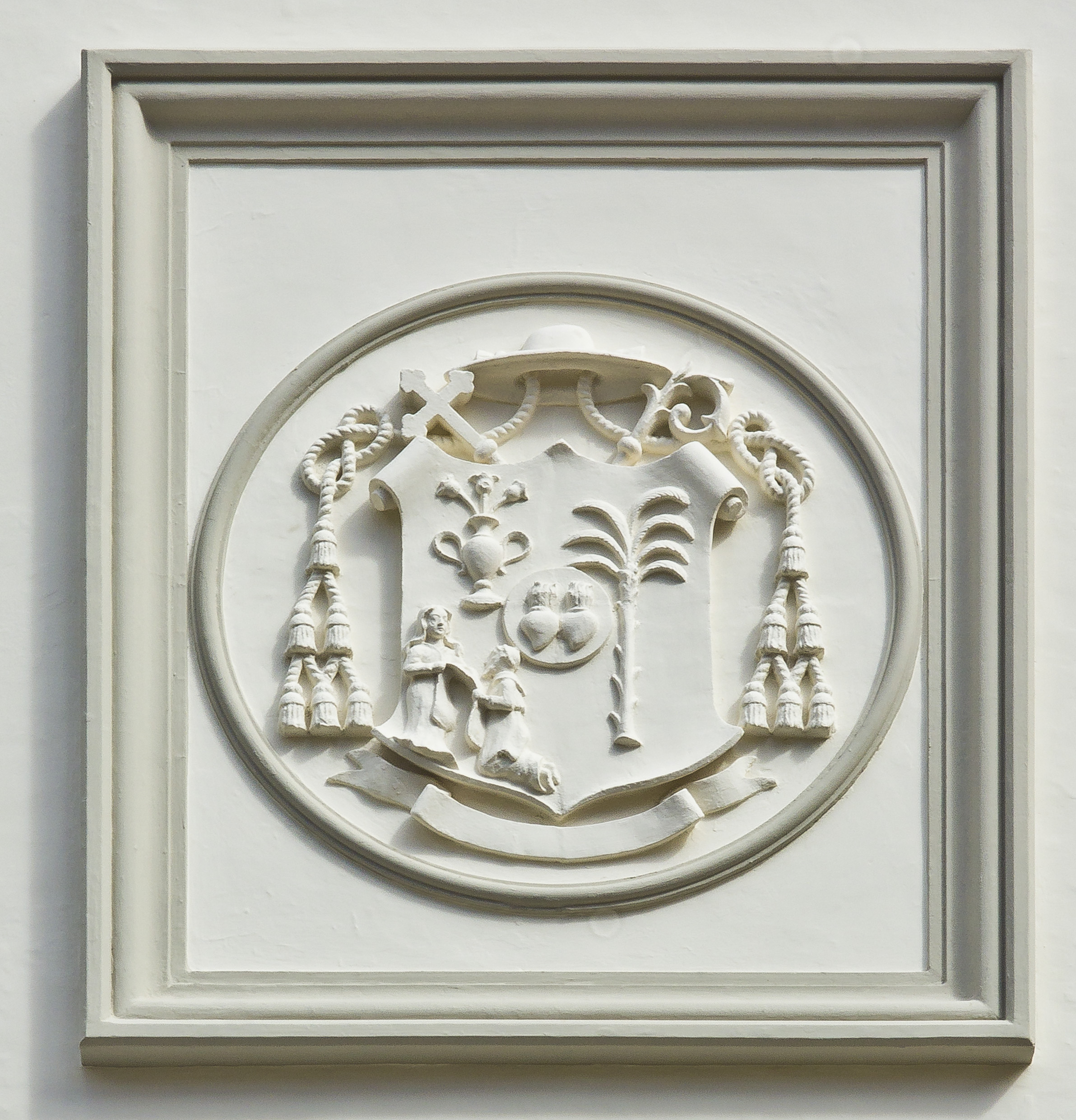 Wappen des Bischofs Nicolas Rey Redondo über dem rechten Seiteneingang der Kathedrale in La Laguna